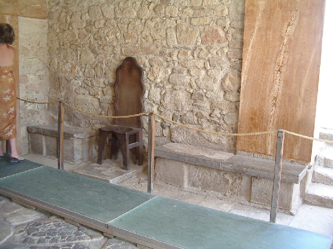 Tron del rei de Cnossos, foto propia